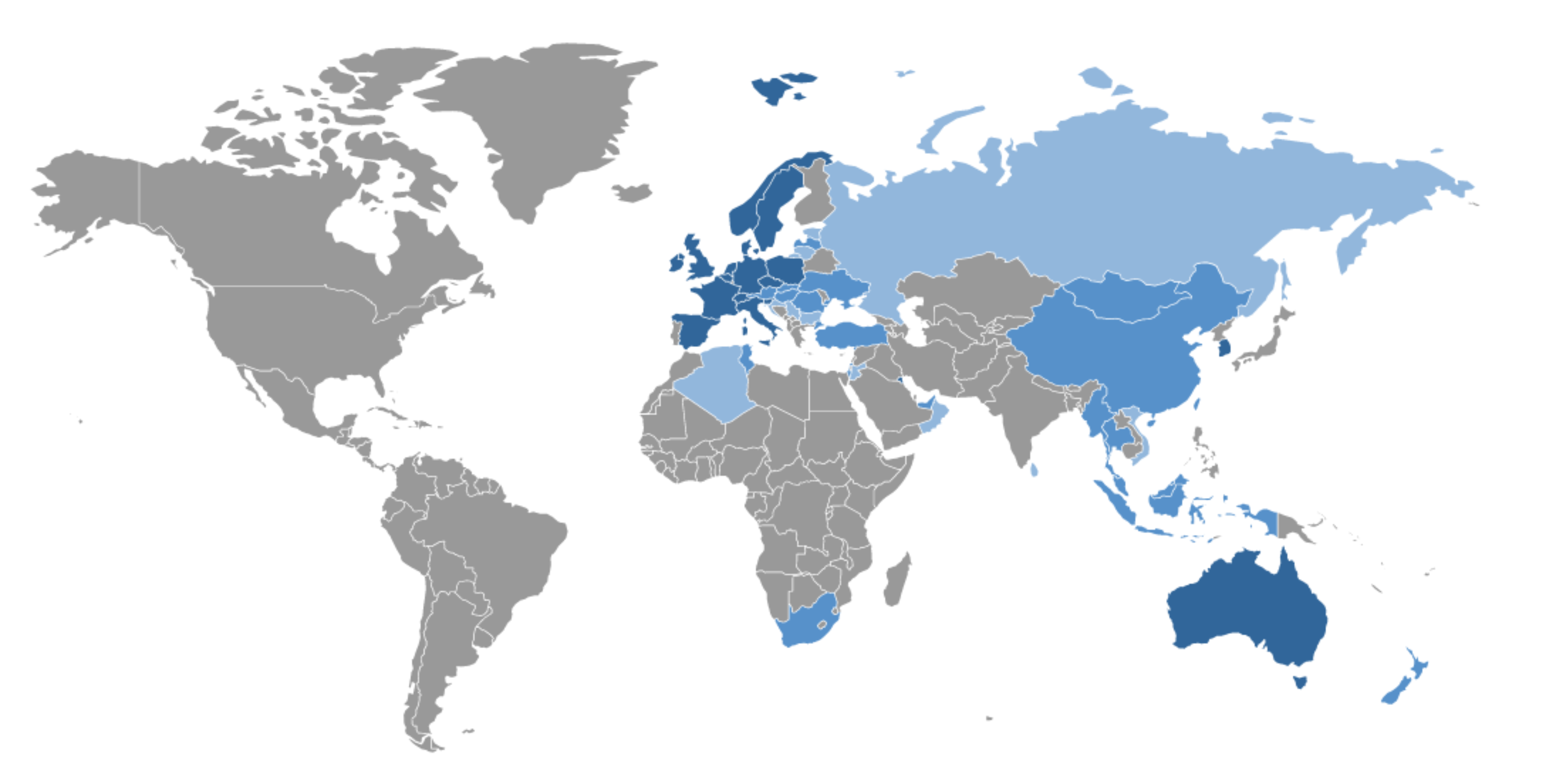 Pokrytí DAB signálem ve světě